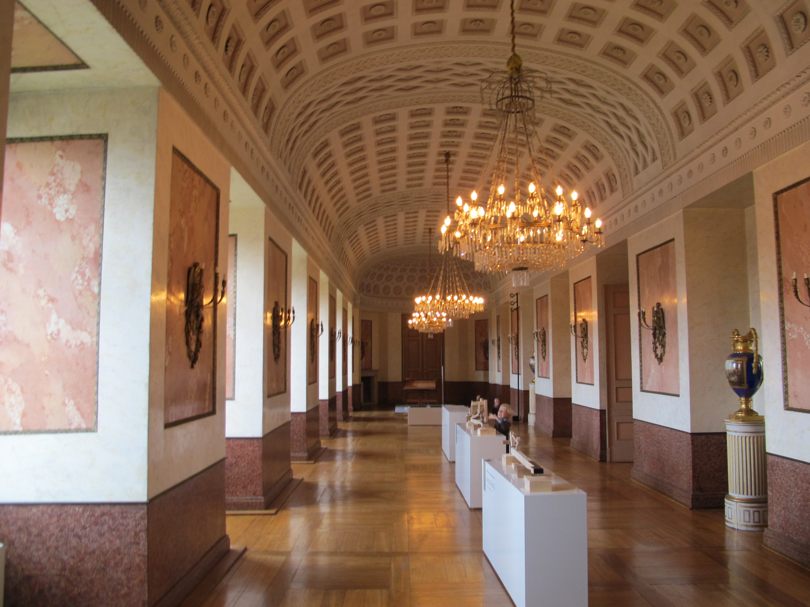 Weimar, castello, interno